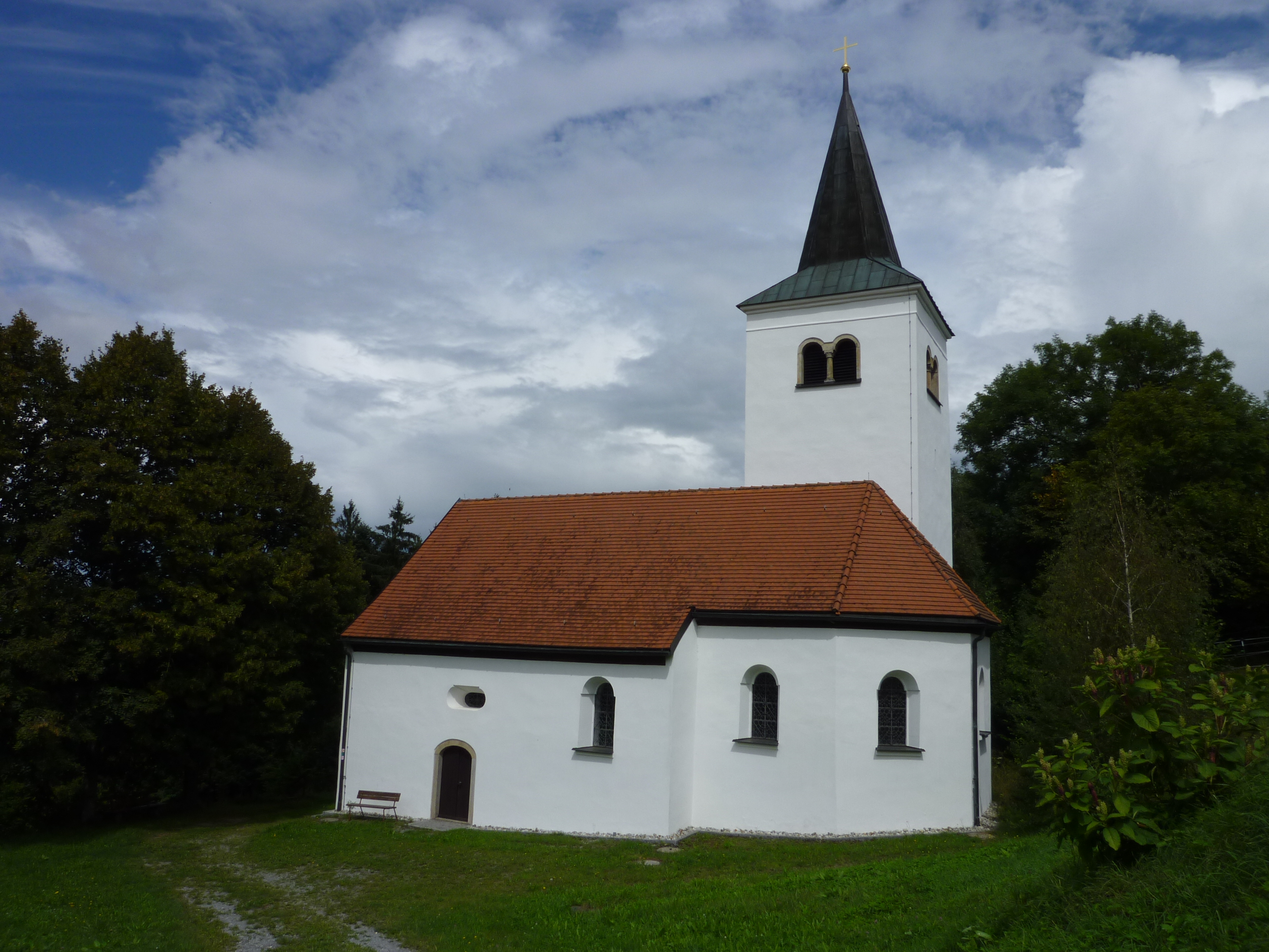 Katholische Filialkirche St. Sixtus im Ort Gallner, Gemeinde Konzell. Liste der Baudenkmäler in Konzell.